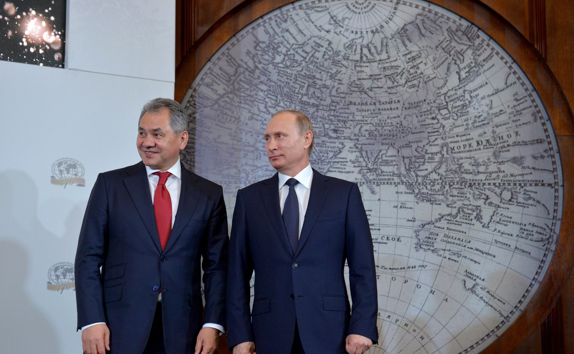 Заседание попечительского совета Русского географического общества